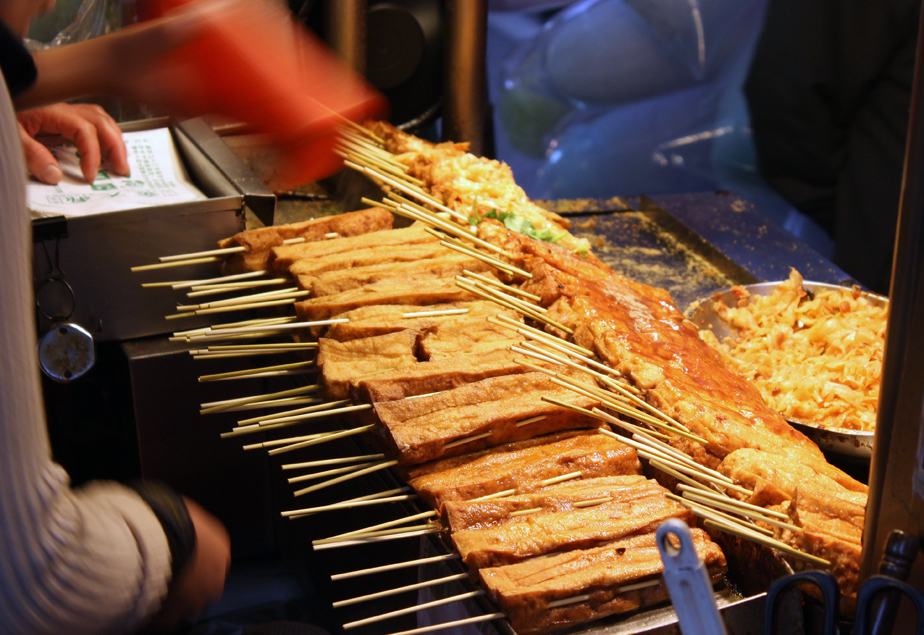 中文（台灣）: 深坑臭豆腐